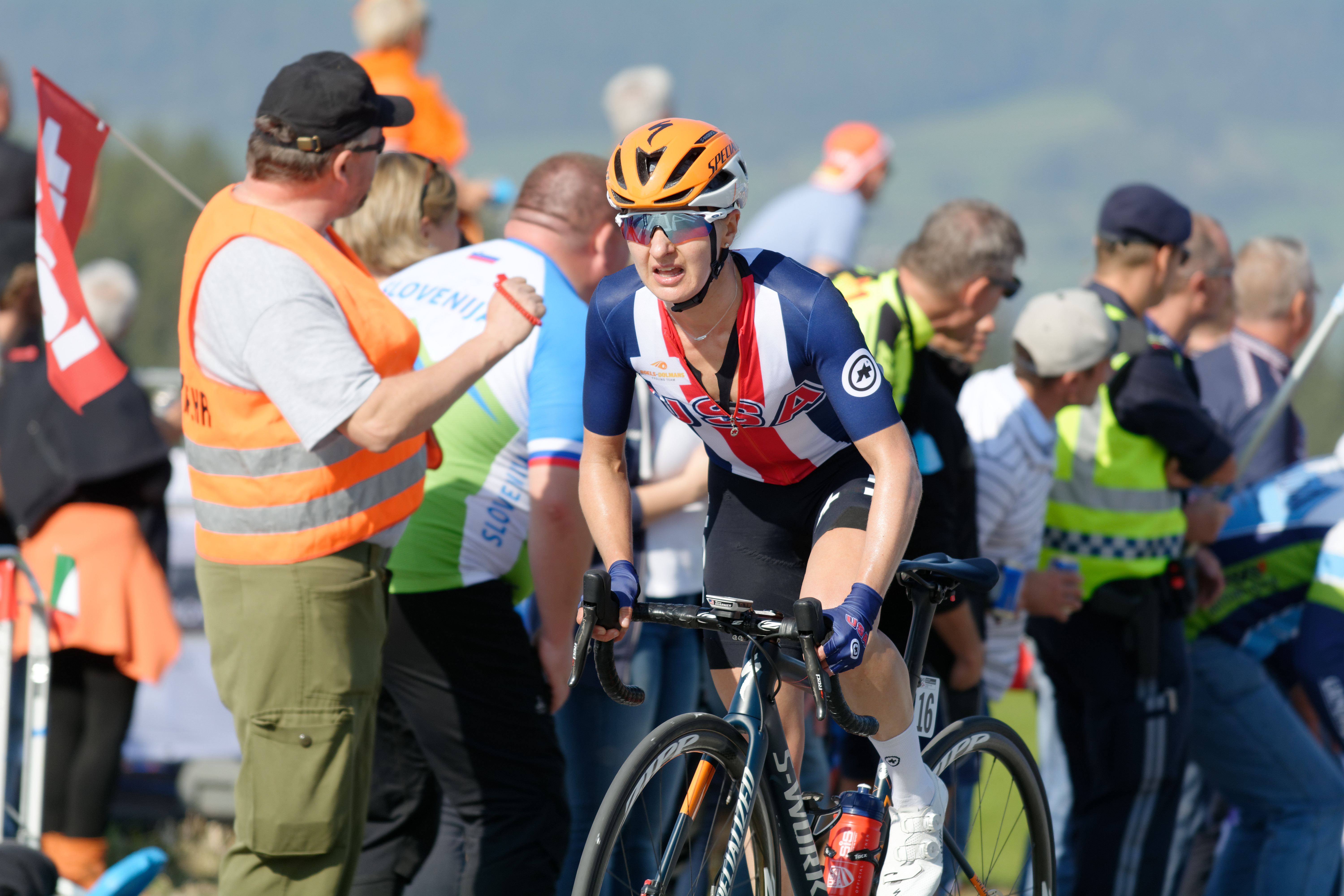 D71_5792_DxO